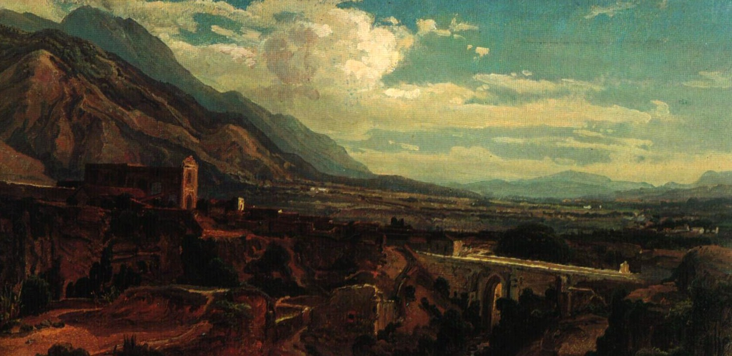 Paisaje de Caracas con viaducto y puente de la Trinidad: alfondo el valle de Chacao.1844-45. Oleo sobre cartulina. 18,2 x 37 cm. Ferdinand Bellermann. Colecion de Museo Estadales en Berlin. Galeria Nacional.